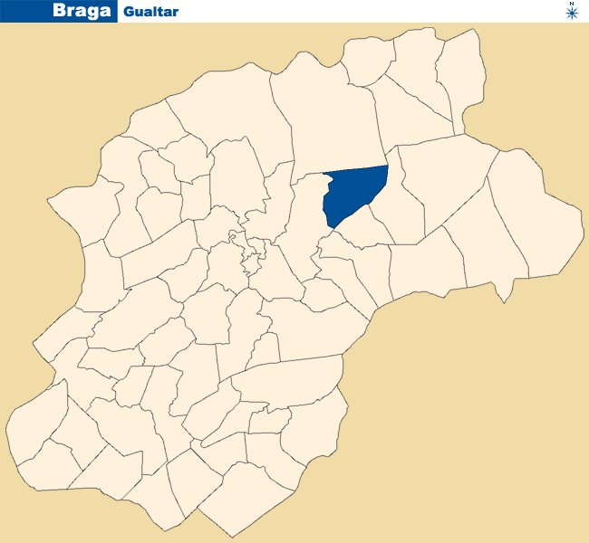 Localização de Gualtar no concelho de Braga.